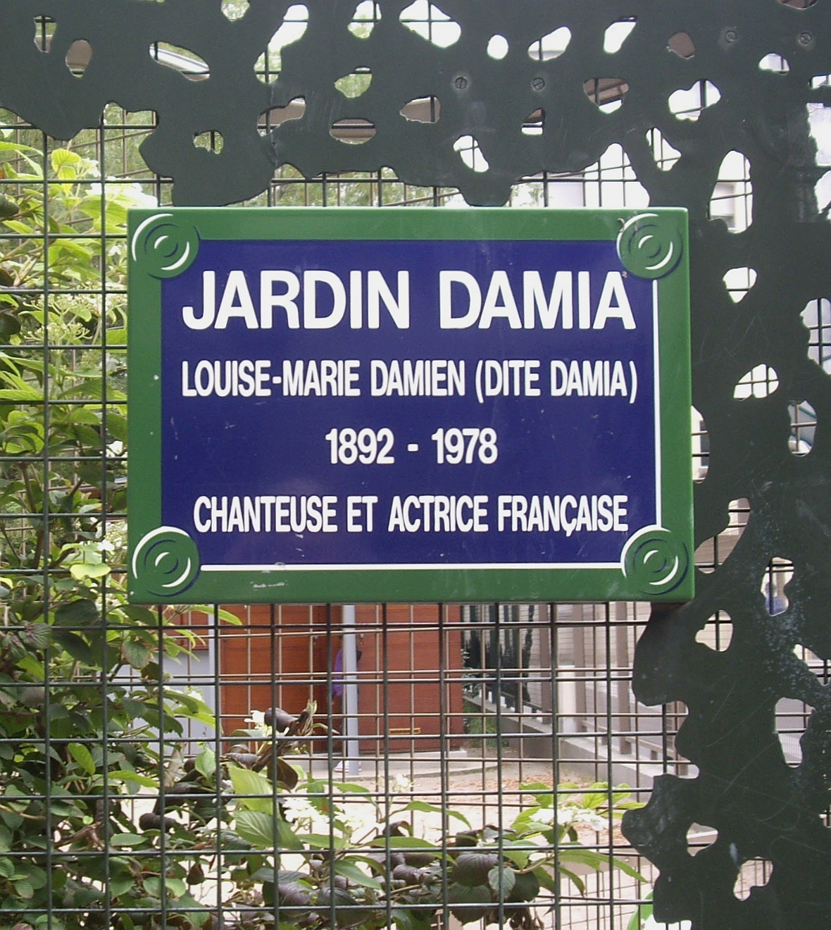 Jardin Damia, Paris 11e. « Louise-Marie Damien, dite Damia, 1892-1978, chanteuse et actrice française. » La date de naissance sur la plaque est incorrecte : Damia naît en 1889.